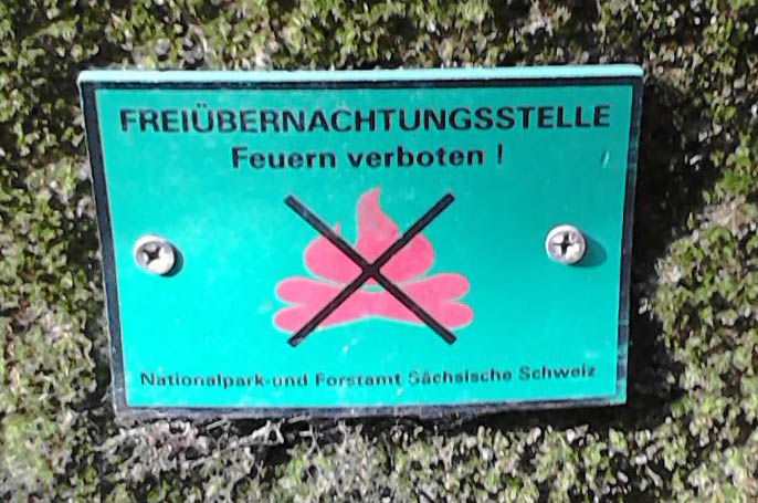 Hinweis auf eine Boofe in der Säschischen Schweiz Bild ist leider nicht so gut.